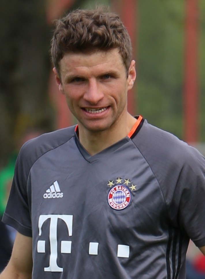 Thomas Müller, am 3. Mai 2017 beim Training auf dem Gelände des FC Bayern München